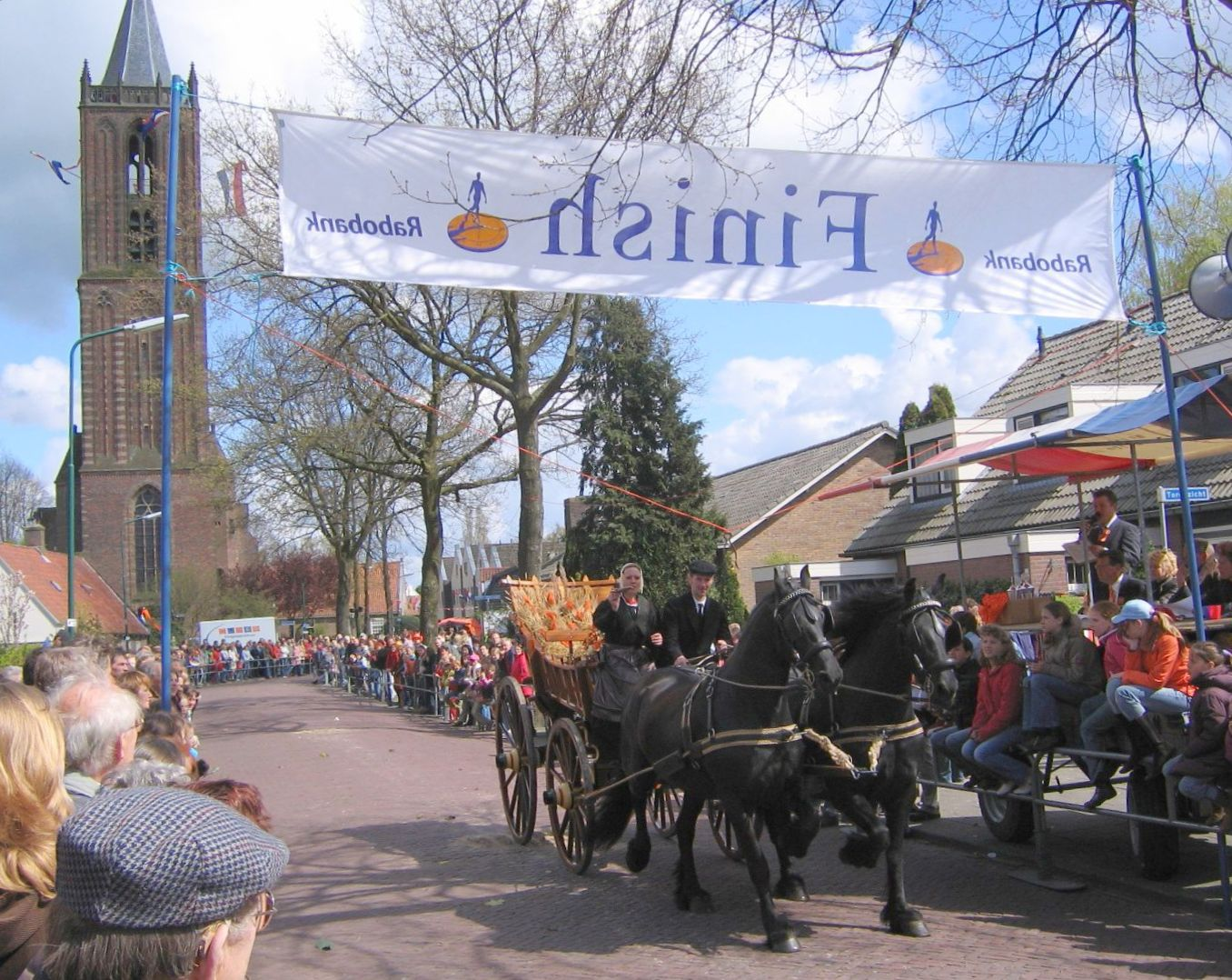 Zelf gemaakte foto 29-04-2006